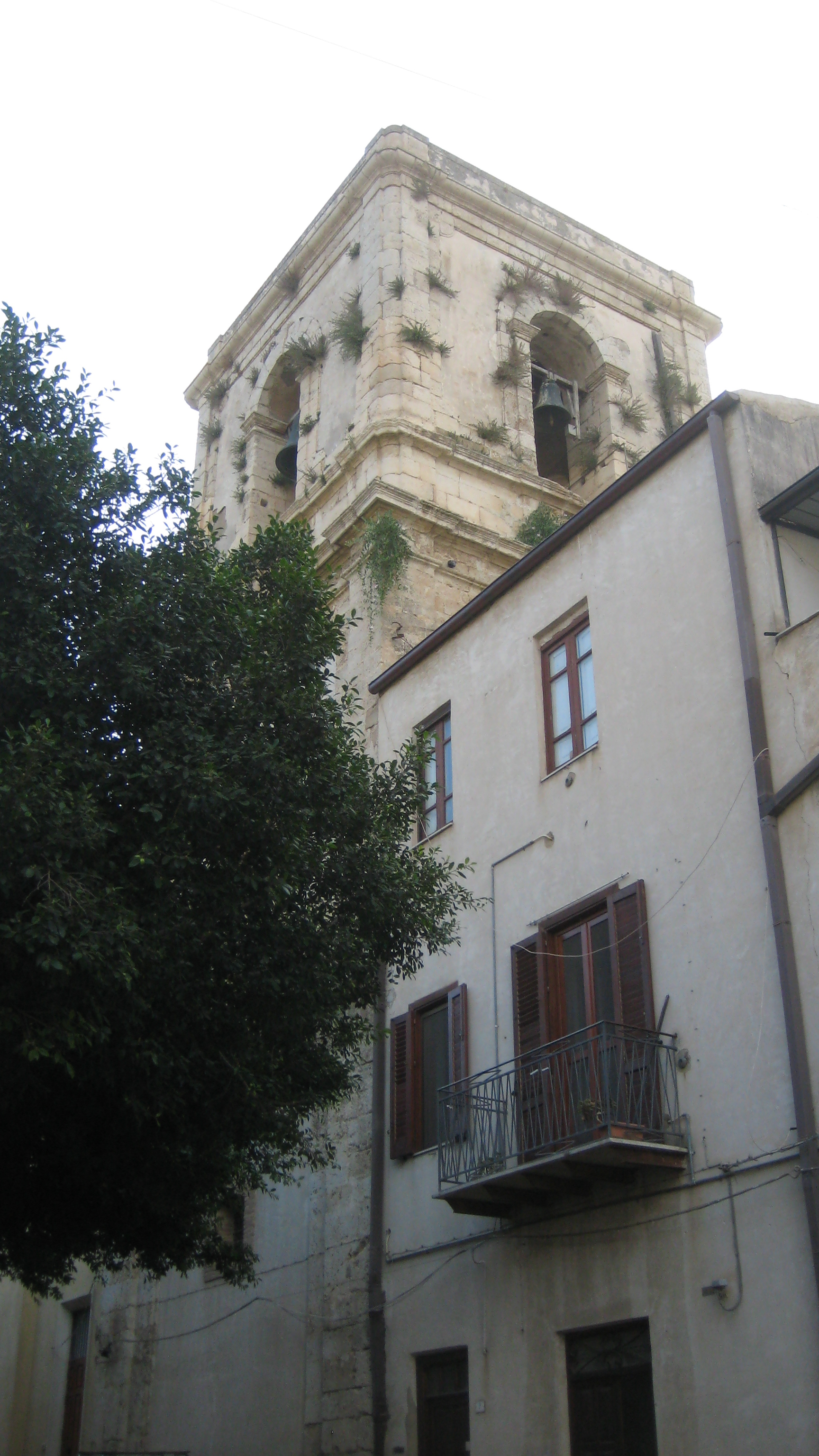 Campanile della Chiesa madre di Grotte (provincia di Agrigento, Sicilia, Italia), fotografato da sud est